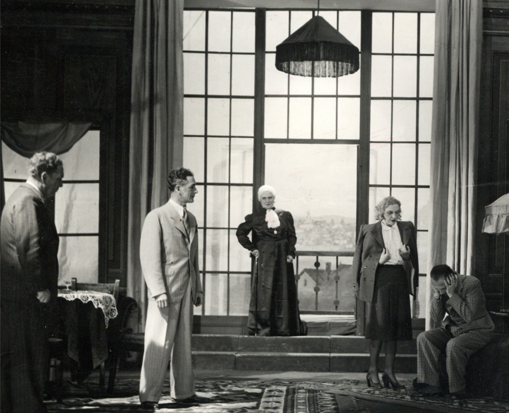 Ferdo Kozak, Lepa Vida/Vida Grantova, Narodno gledališče v Ljubljani. Na fotografiji: Ivan Levar (Mihael Grant), Emil Kralj (Tomo Grant), Avgusta Danilova (Gospa Bornova), Mira Danilova (Vida Grantova), Slavko Jan (Andrej Grant).